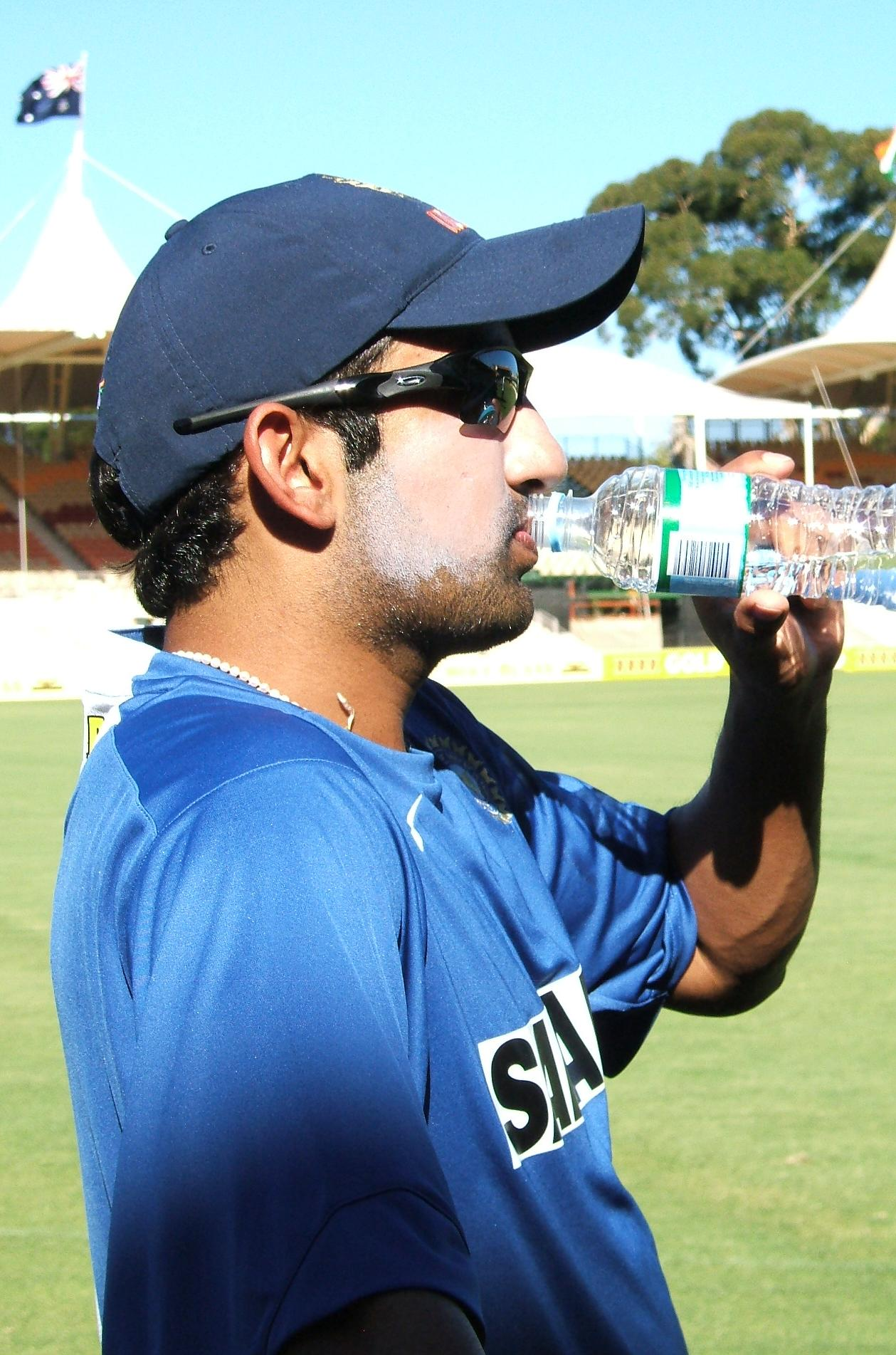 Gautam Gambhir at Adelaide Oval